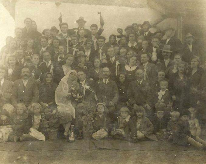 Српски (ћирилица): Чешки сватови у Новој Веси, код Српца, 1934. године.